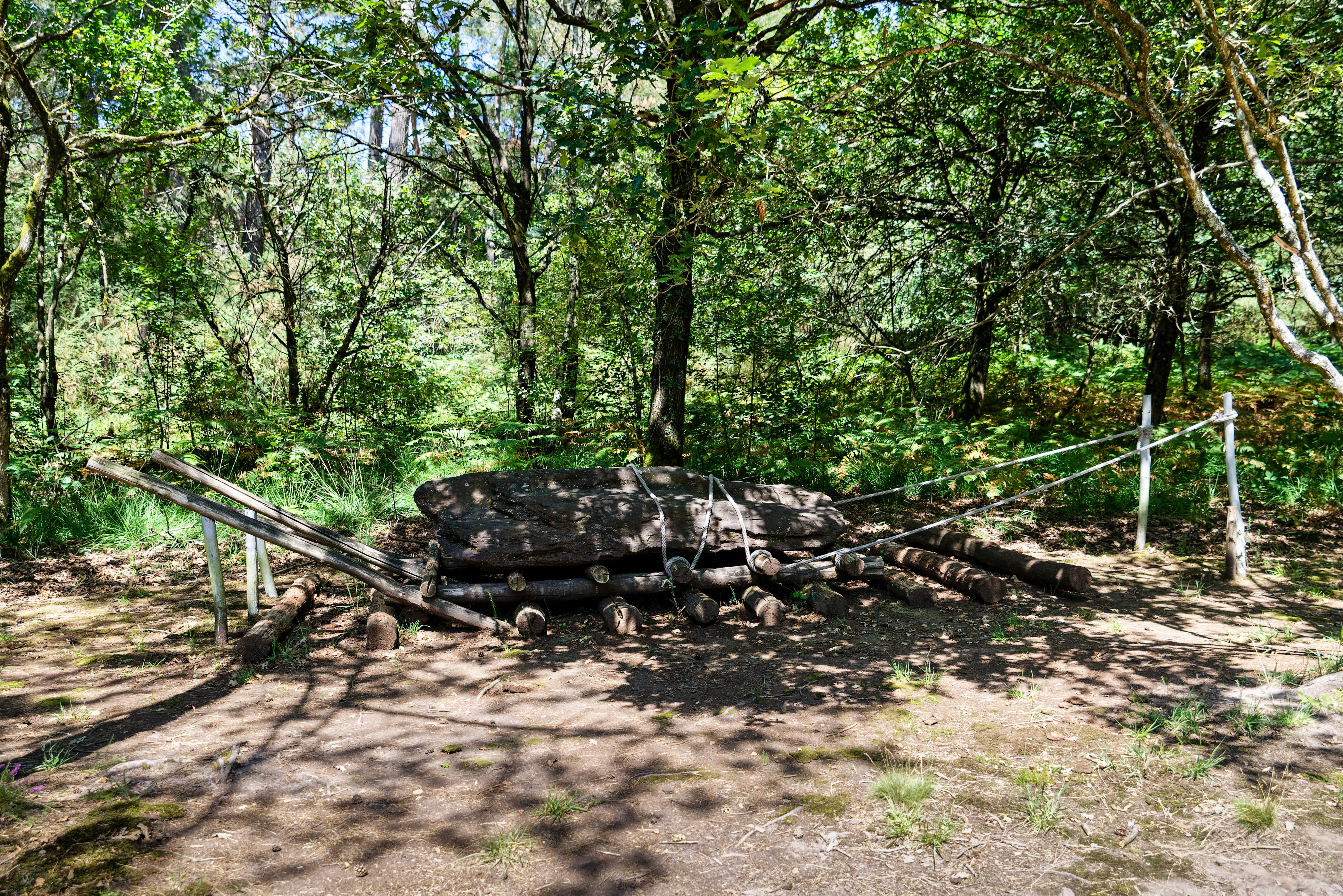 Menhirs de Monteneuf, archéosite de Brocéliande : Reconstitutions. (Monteneuf, Morbihan, Bretagne, France)